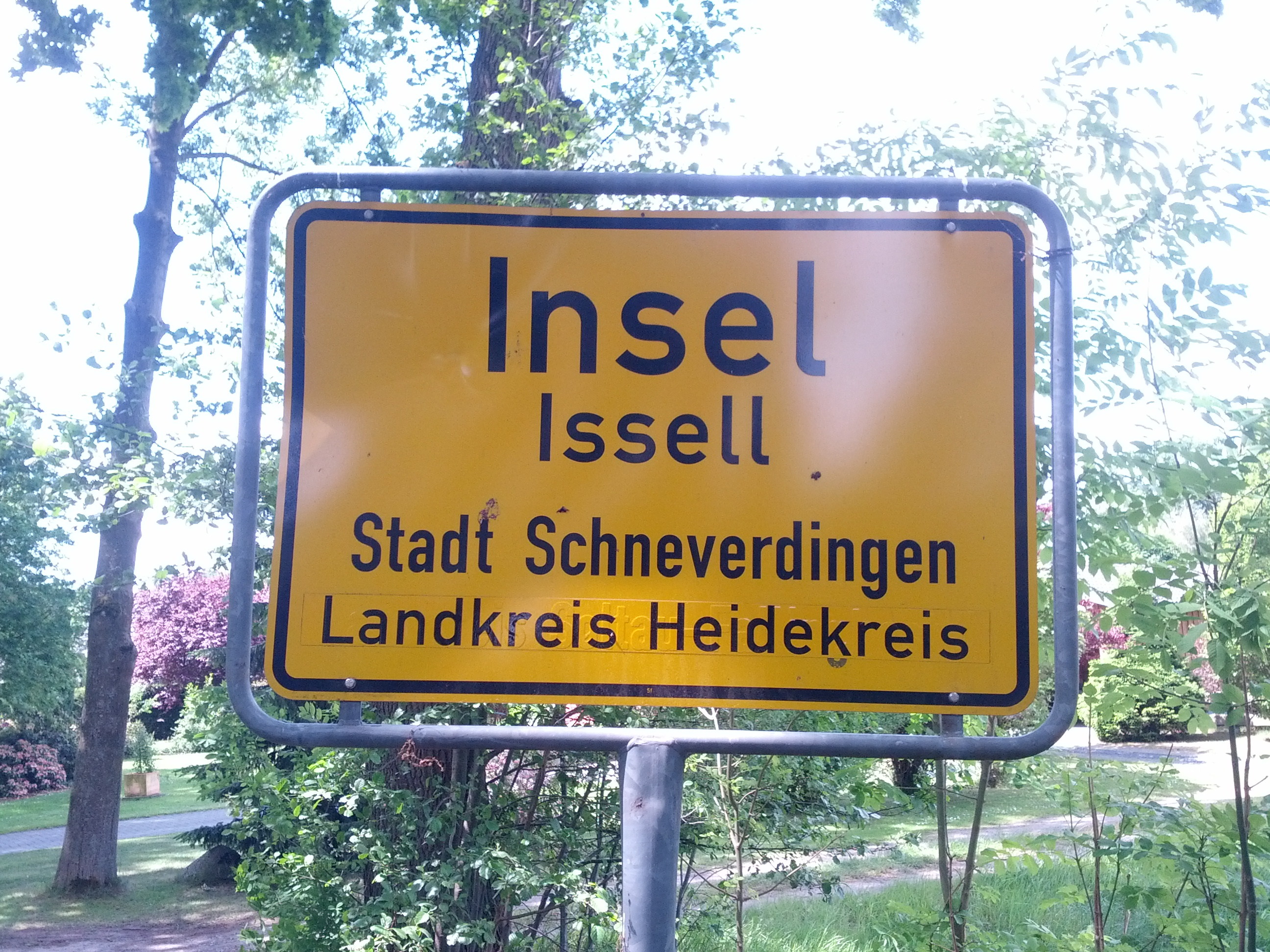 Oortsschild von Issell, Landkreis Heidkreis, mit den Naam op Hoochdüütsch un op Plattdüütsch